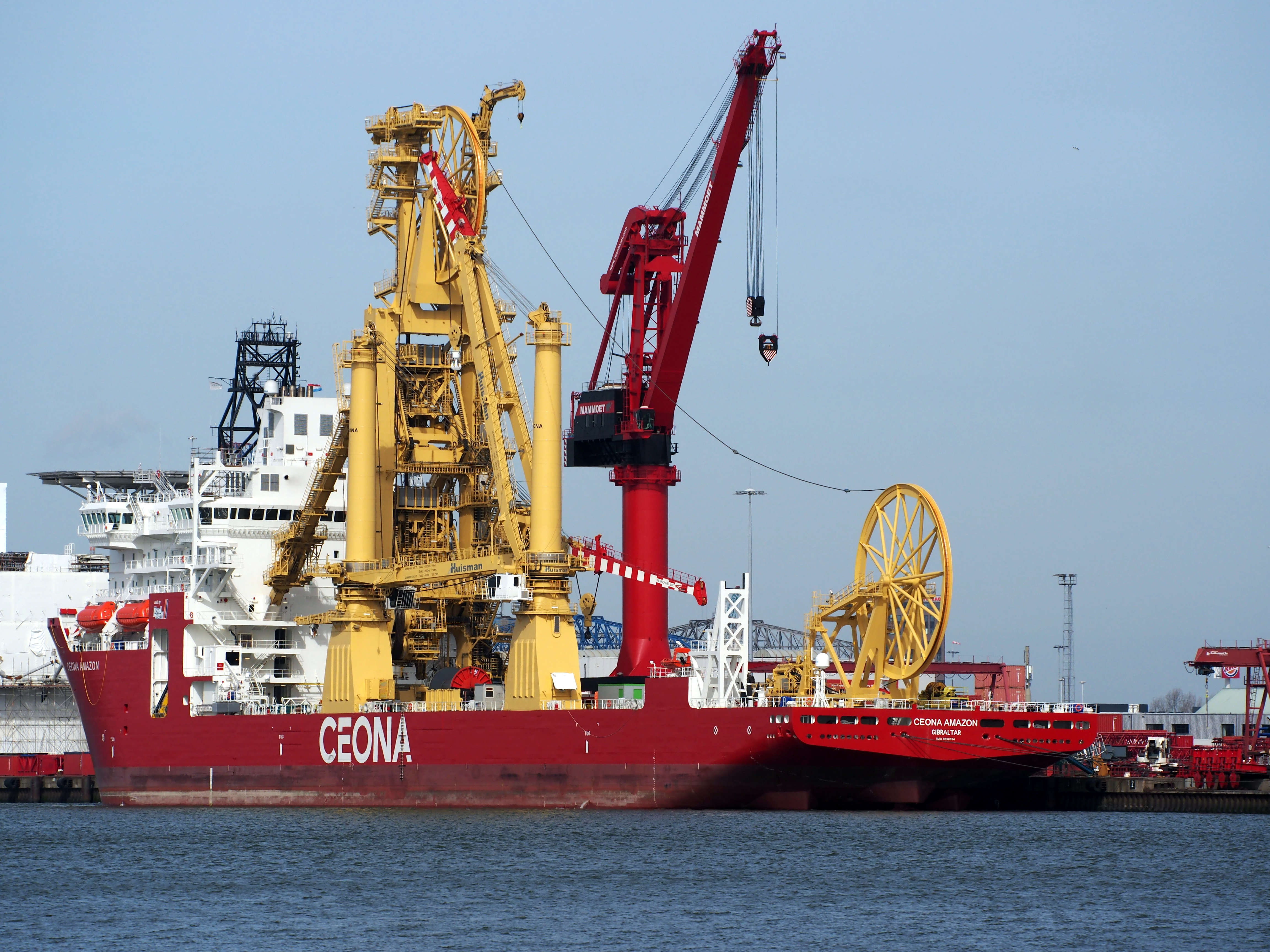 Ceona Amazon - IMO 9698094, Het Scheur, Port of Rotterdam.